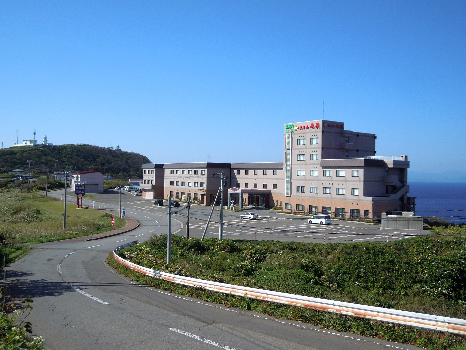 青森県東津軽郡外ヶ浜町にある竜飛崎温泉（ホテル竜飛）の遠景。左奥に見えるのは龍飛埼灯台など。